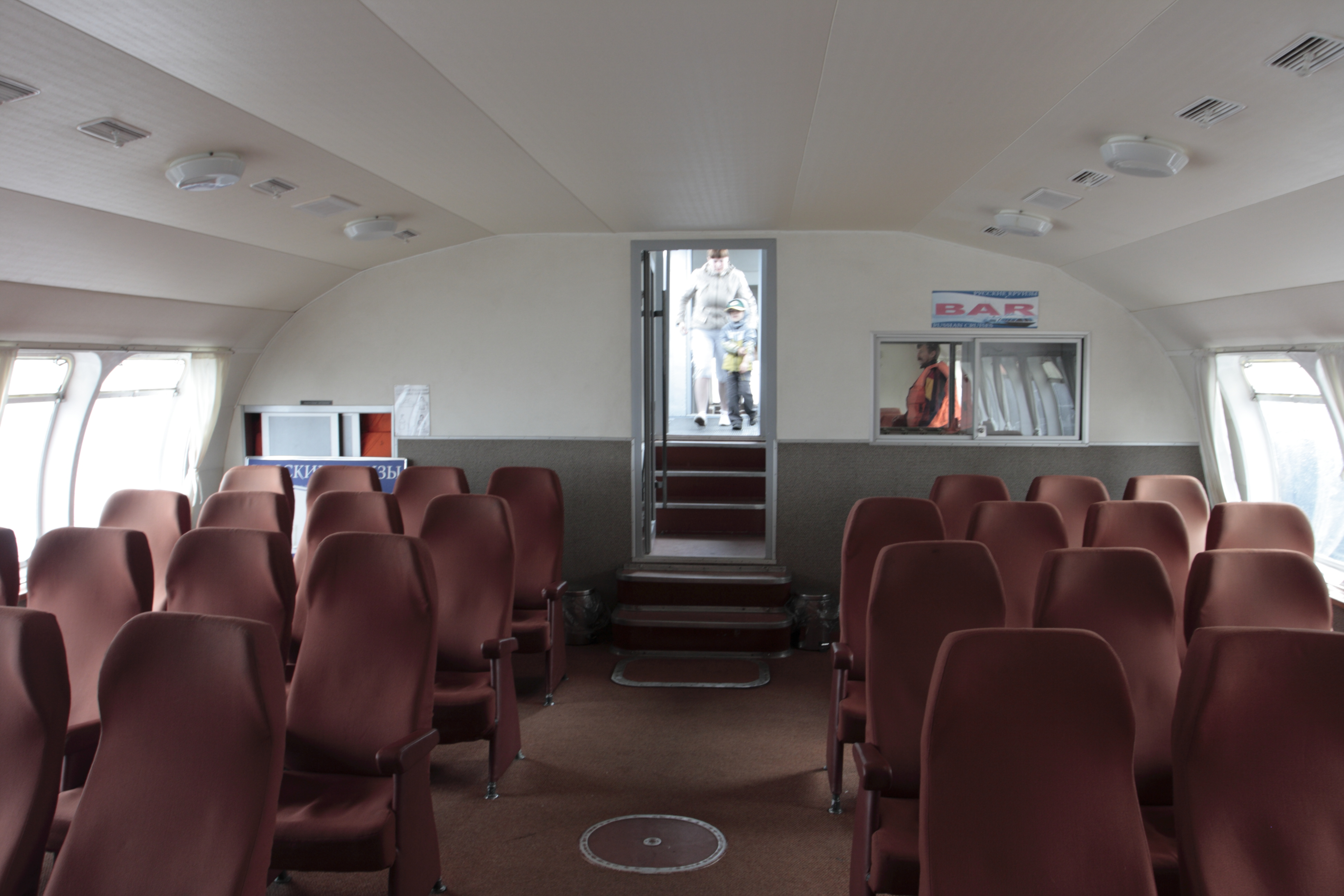 Средний салон в "Метеоре"